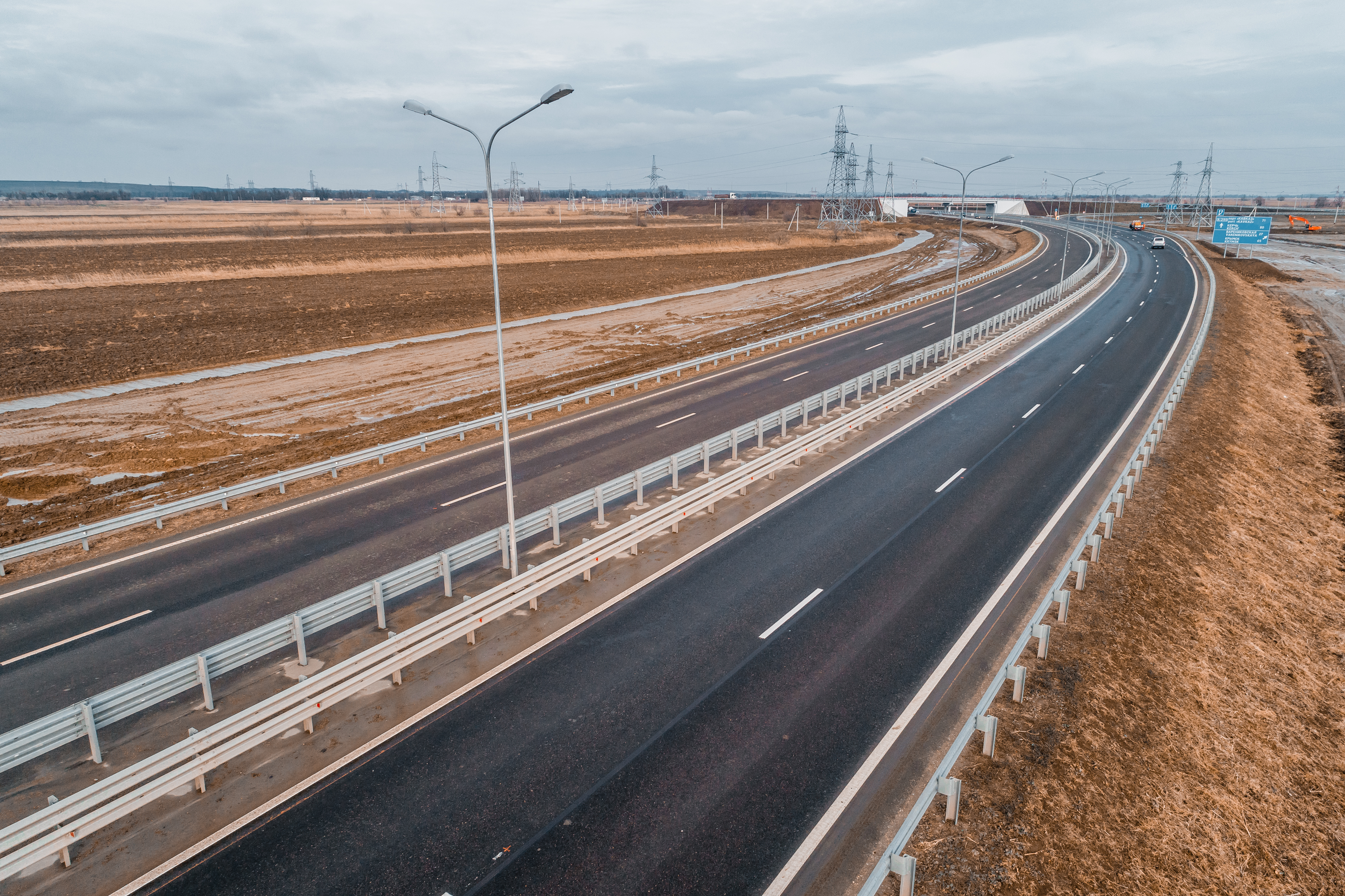 Транспортная развязка в районе села Джигинка на 73-м км трассы А-290 (Росавтодор)